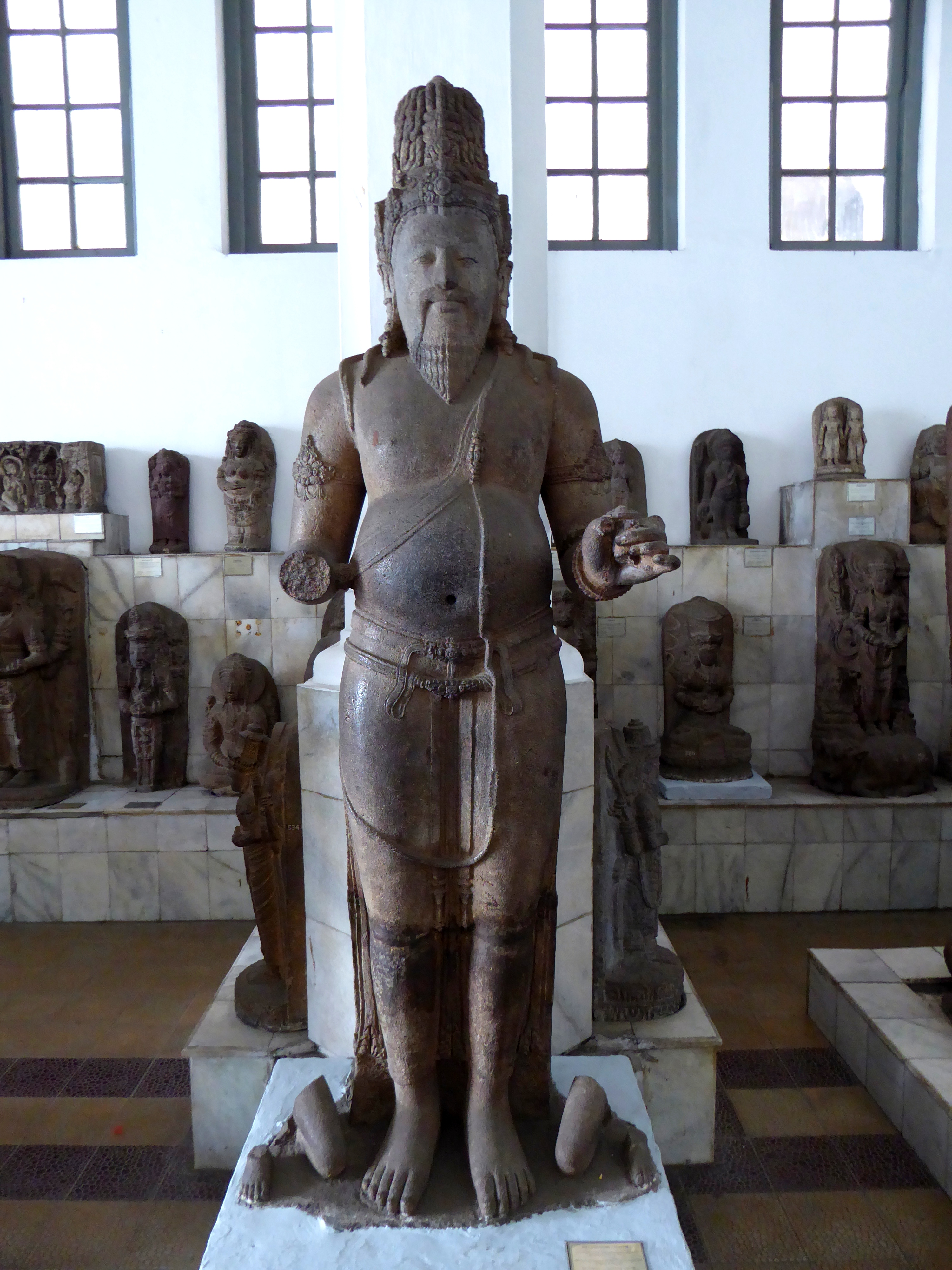 067 Siva Mahaguru Agastya, Cando Banon, Magelang, Central Java, 8-9th c, National Museum, Jakarta, Java